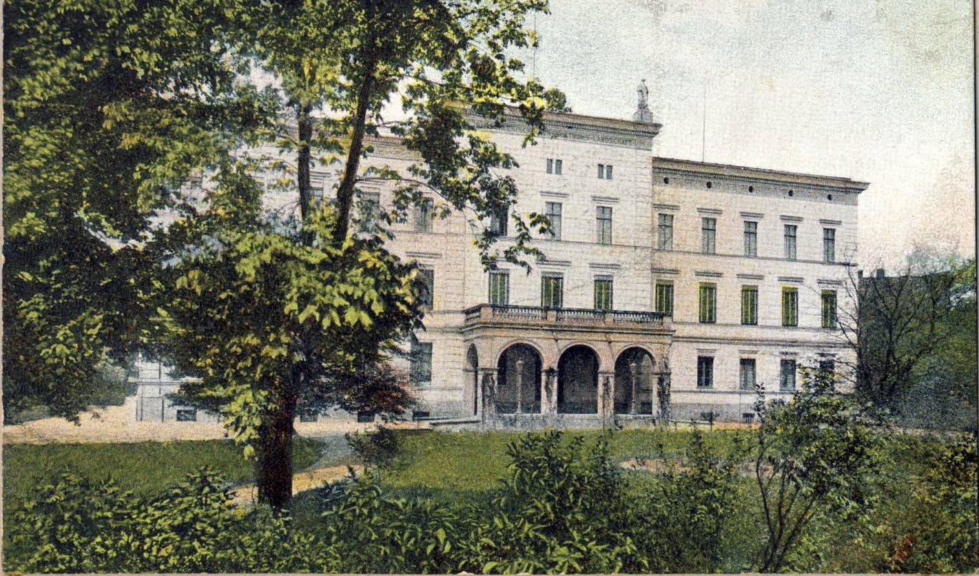 Gebäude der Oberschlesischen Fürstentumslandschaft in Ratibor